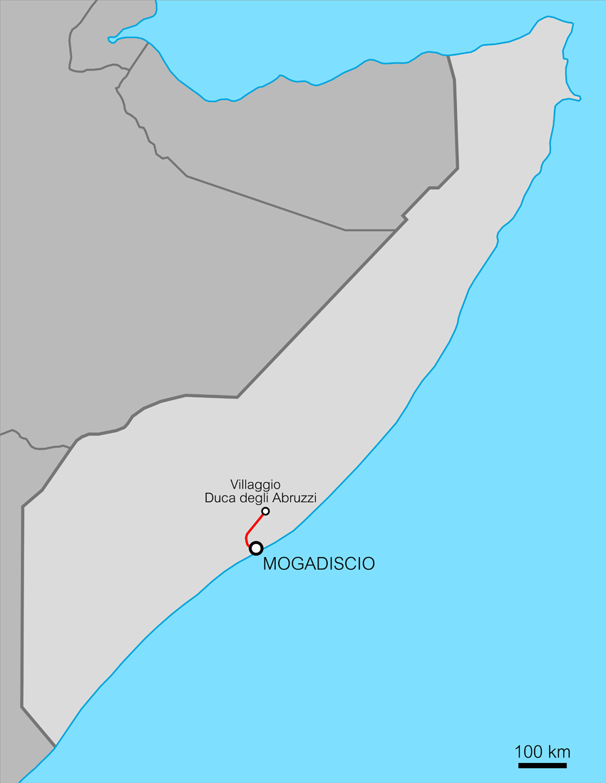 La rete ferroviaria della Somalia Italiana